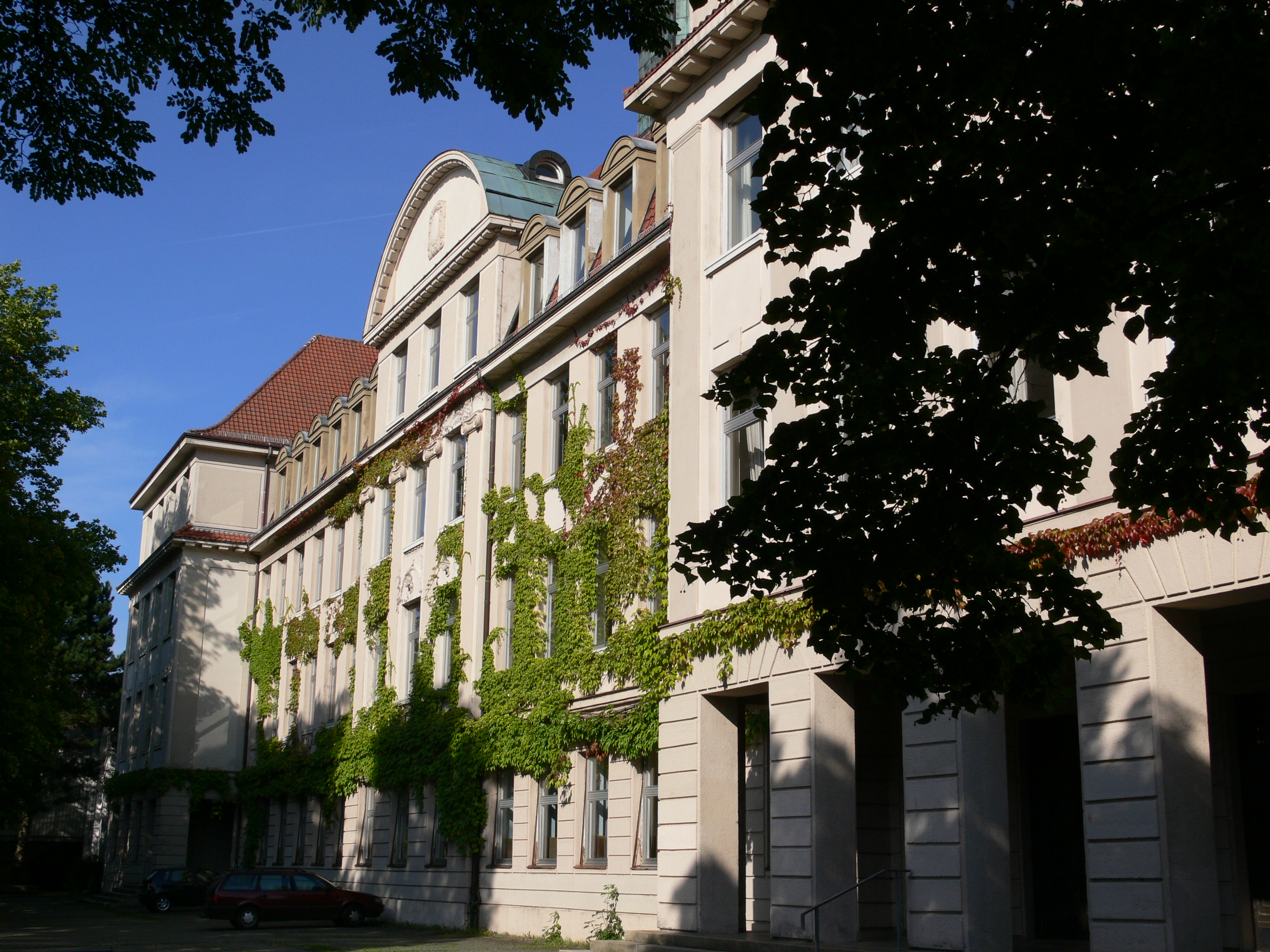 Spohn-Gymnasium Ravensburg Westfassade